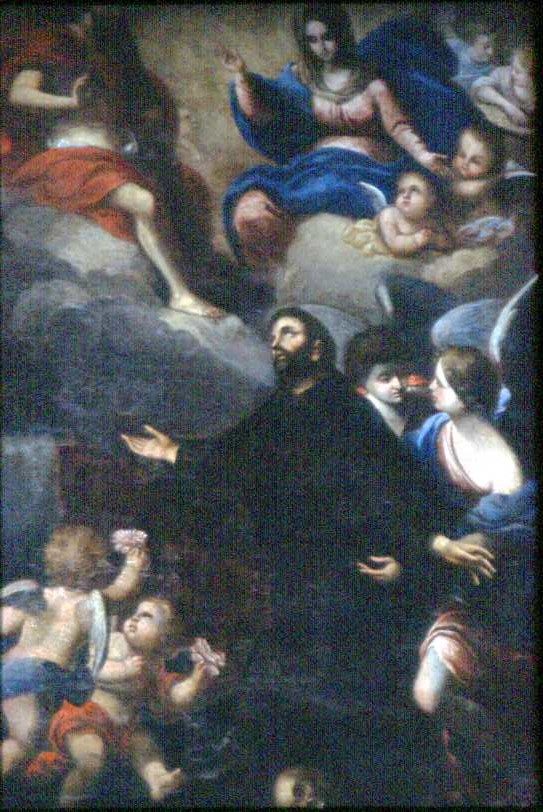 San Francesco d'Assisi che chiede l'Indulgenza della Porziuncola: tela del seicento di Andrea Carrera; sull'altare maggiore